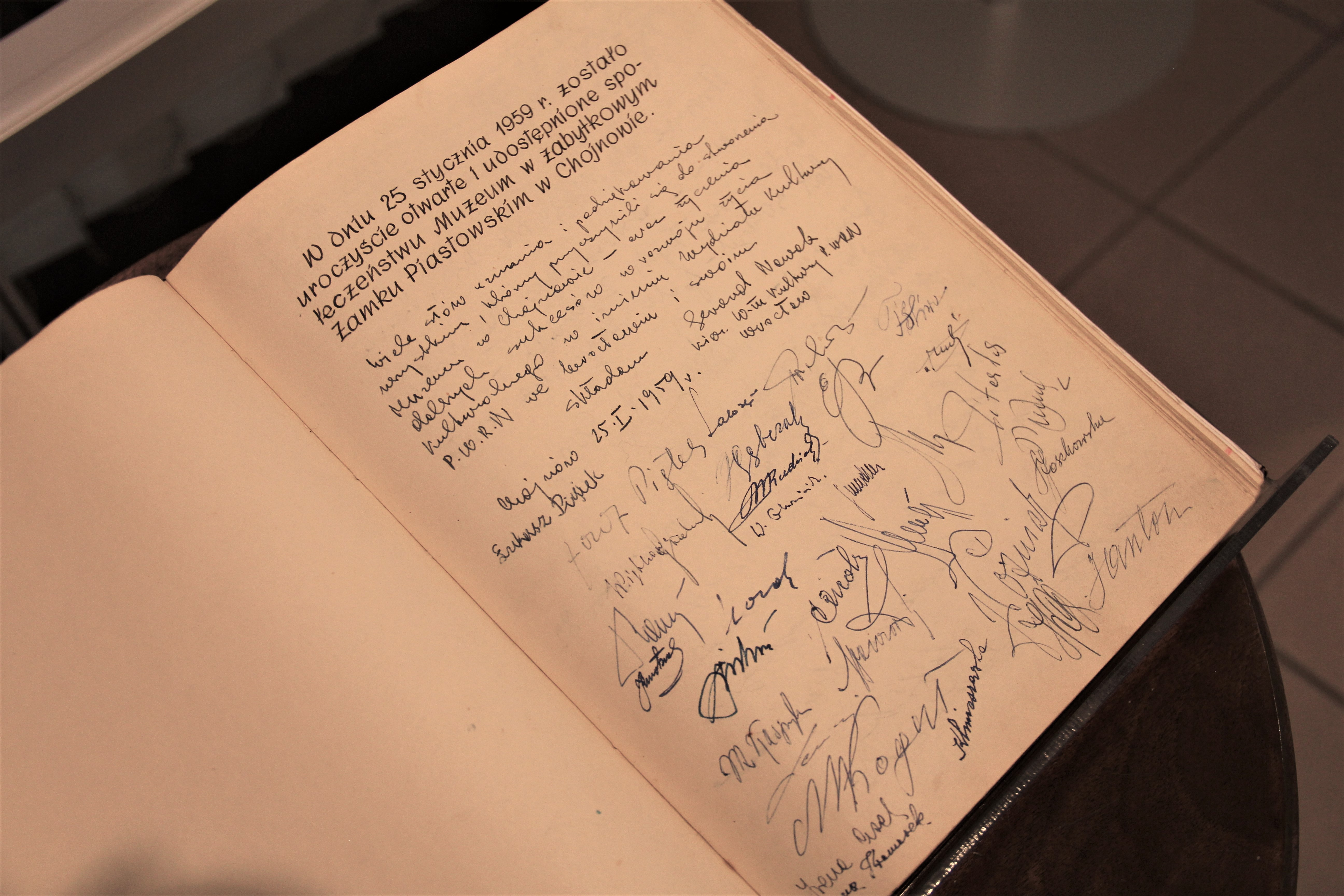 Wpis z okazji rozpoczęcia działalności Muzeum Miejskiego w Chojnowie w kronice muzealnej.